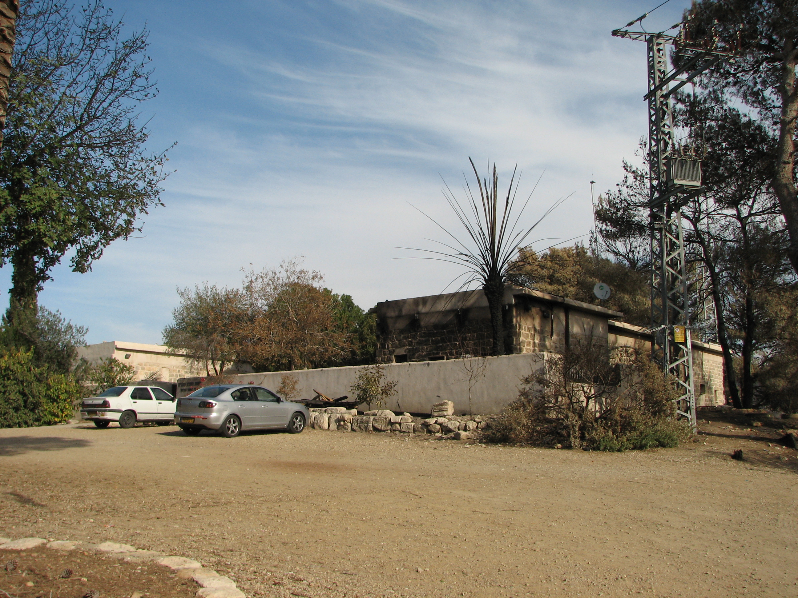 חוות משמר הכרמל או בשמה המקורי "ח'ירבת שלאלה" שוכנת על גבעה מורמת בלב הכרמל. באתר מבנה חאן עתיק. היום משמשת כמרכז לפעילות של רשות הטבע והגנים